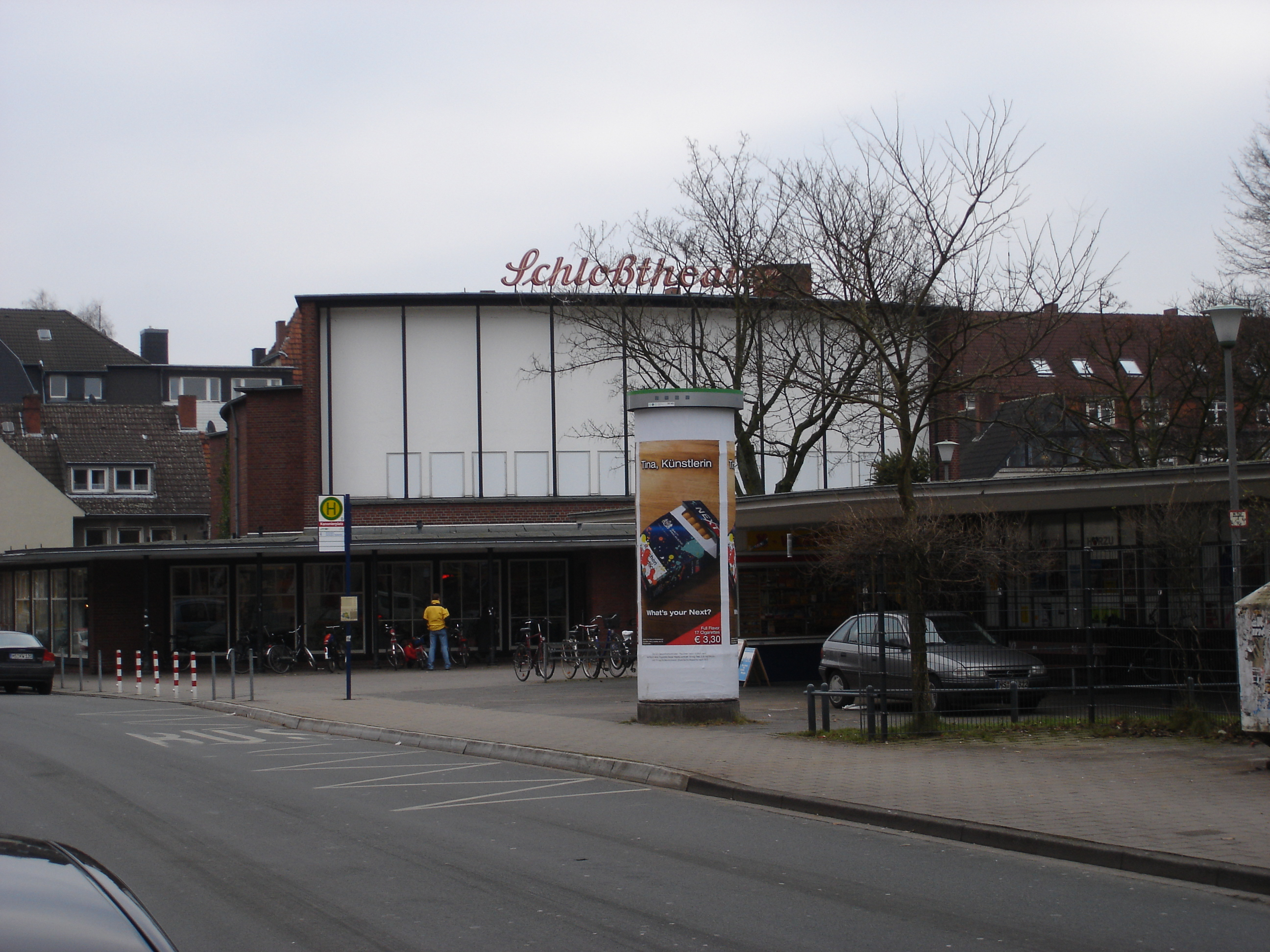 The cinema "Schlosstheater" in Münster, Westphalia, Germany